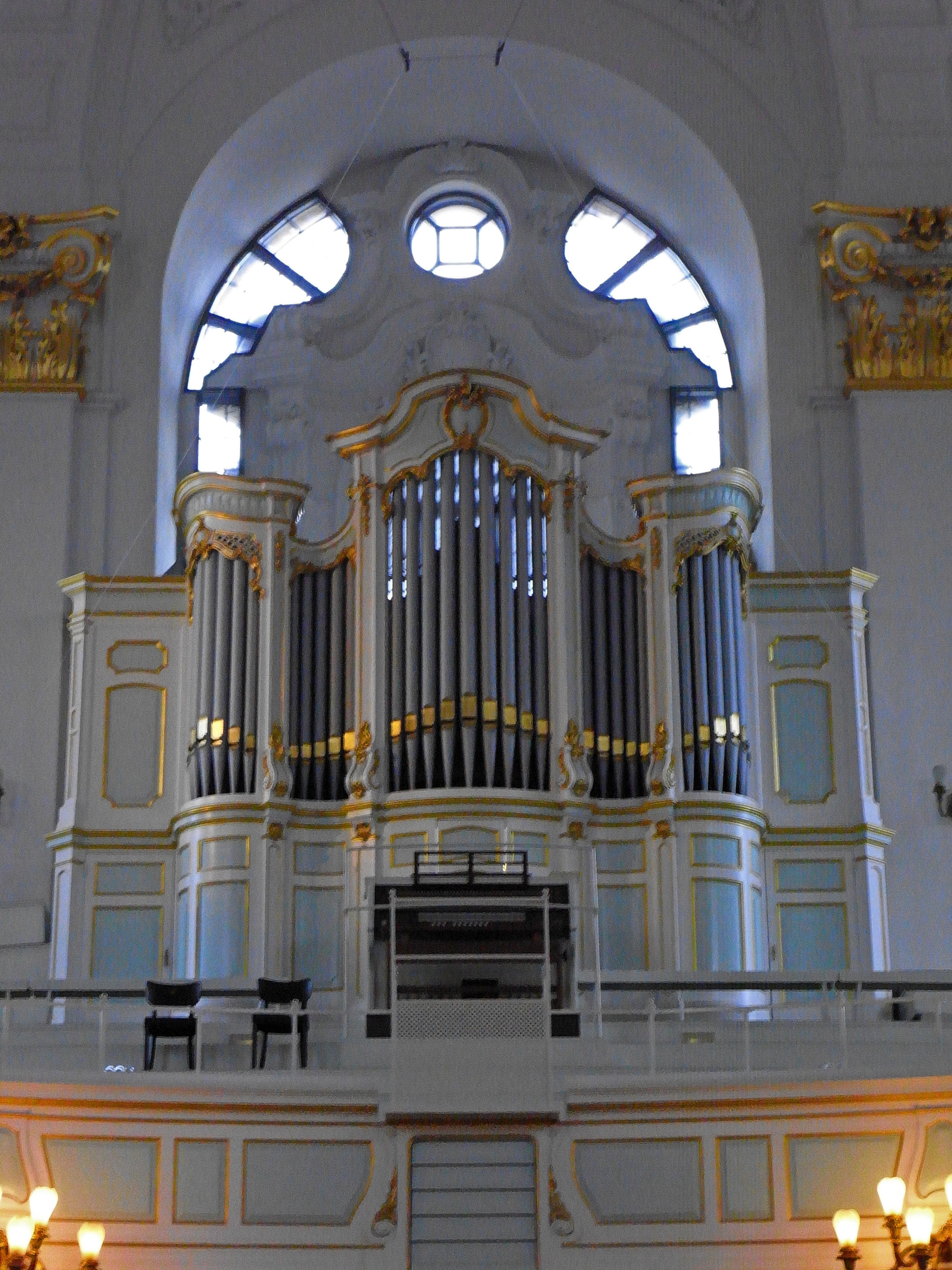 Marcussen-Orgel in Sankt Michaelis, Hamburg